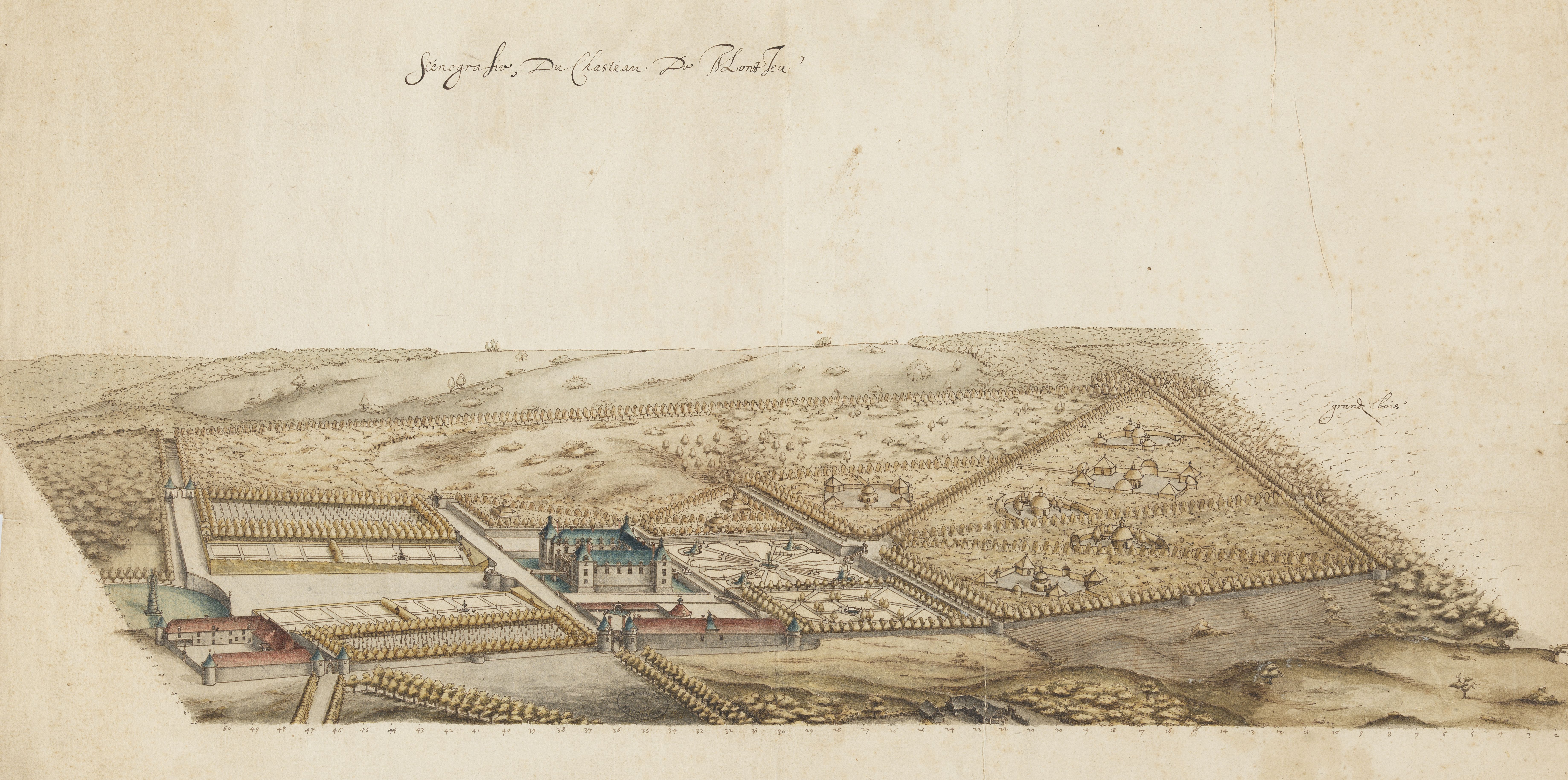 Jacques Lemercier, « Scenografie du chasteau de Montjeu », Vue à vol d’oiseau du château et du parc de Montjeu, s.d. [vers 1620]